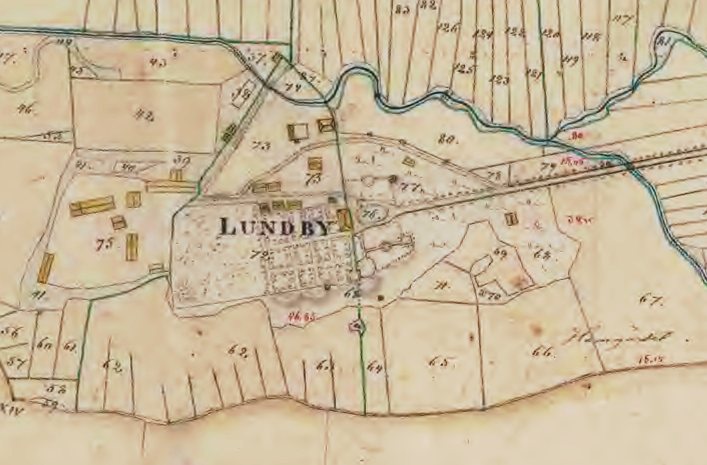 Stora Lundby, huvudbebyggelsen